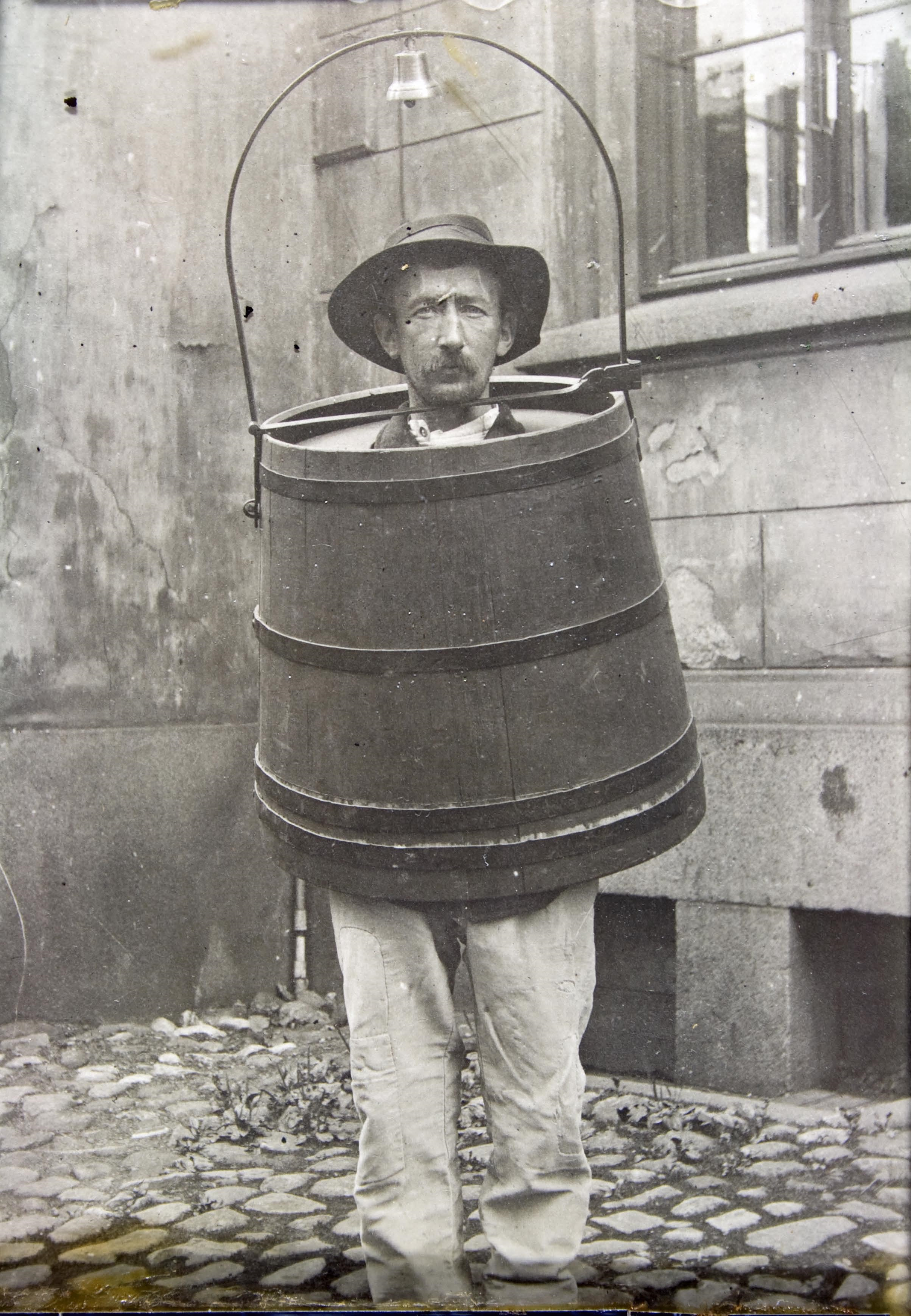 Foto av en mann iført spansk kappe